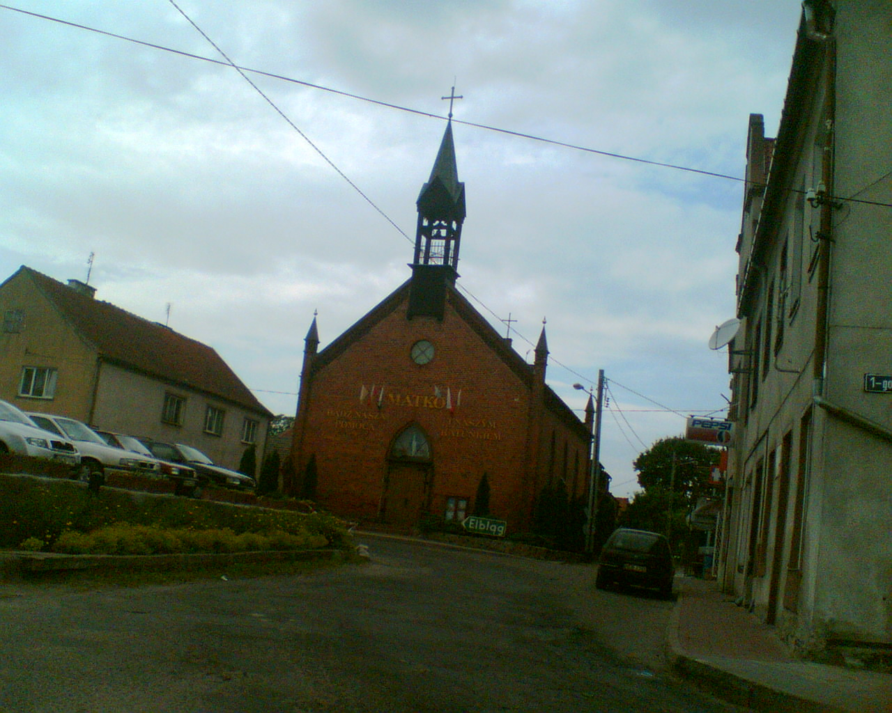 Kościół Niepokalanego Poczęcia NMP